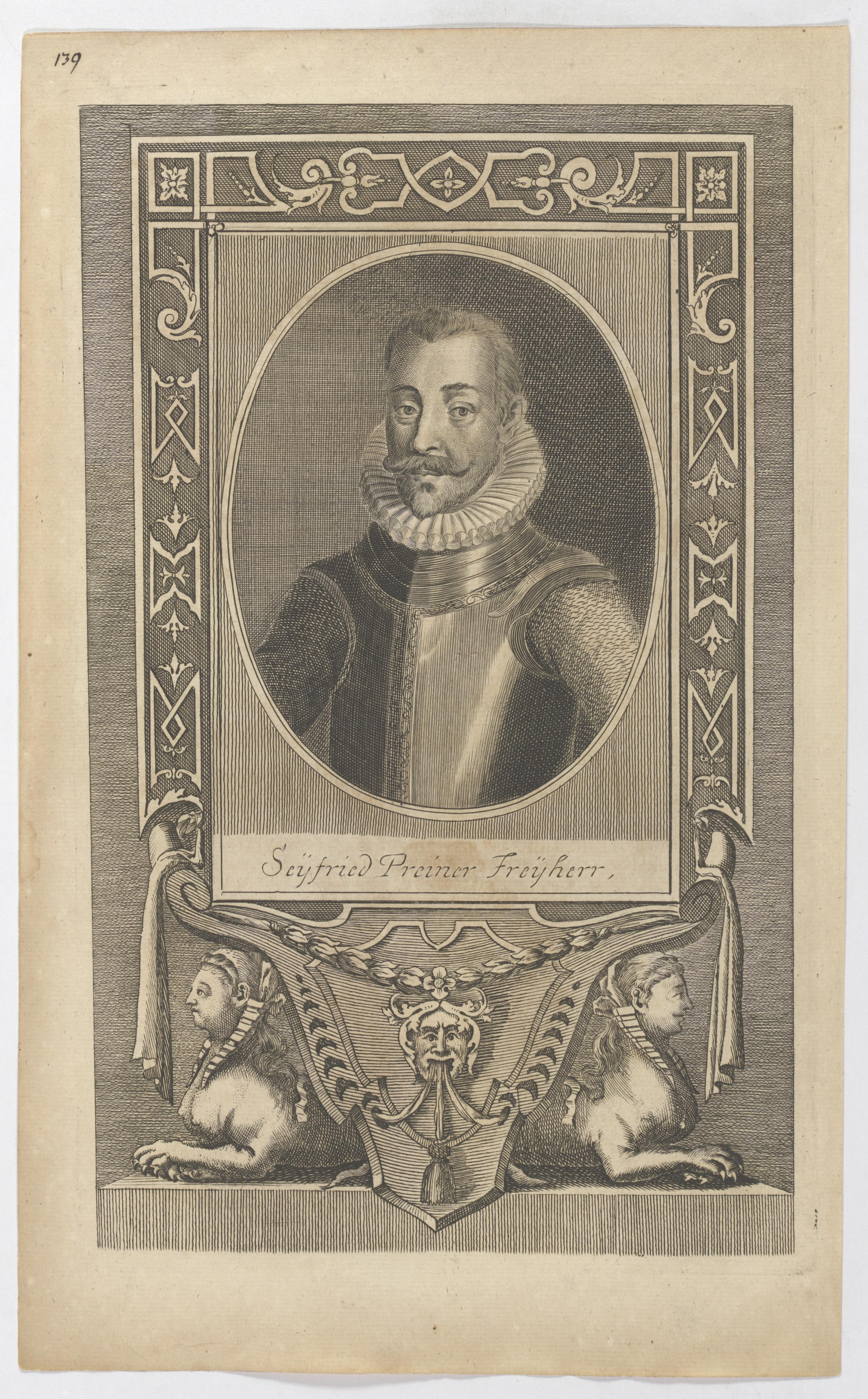 Bildnis des Seyfried Preiner (Seyfried von Breuner) LWL-Landesmuseum für Kunst und Kulturgeschichte Münster Kupferstich; Radierung 295 x 185 mm (Platte); 339 x 208 mm (Blatt) Münster, LWL-Landesmuseum für Kunst und Kulturgeschichte, Porträtarchiv Diepenbroick, Inventar-Nr. C-511644 PAD Teil von: Weidmann, Moritz Georg (1686), Annalium Ferdinandeorum Frantz Christoph Khevenhillers …, Buch, 1721-1726, Leipzig